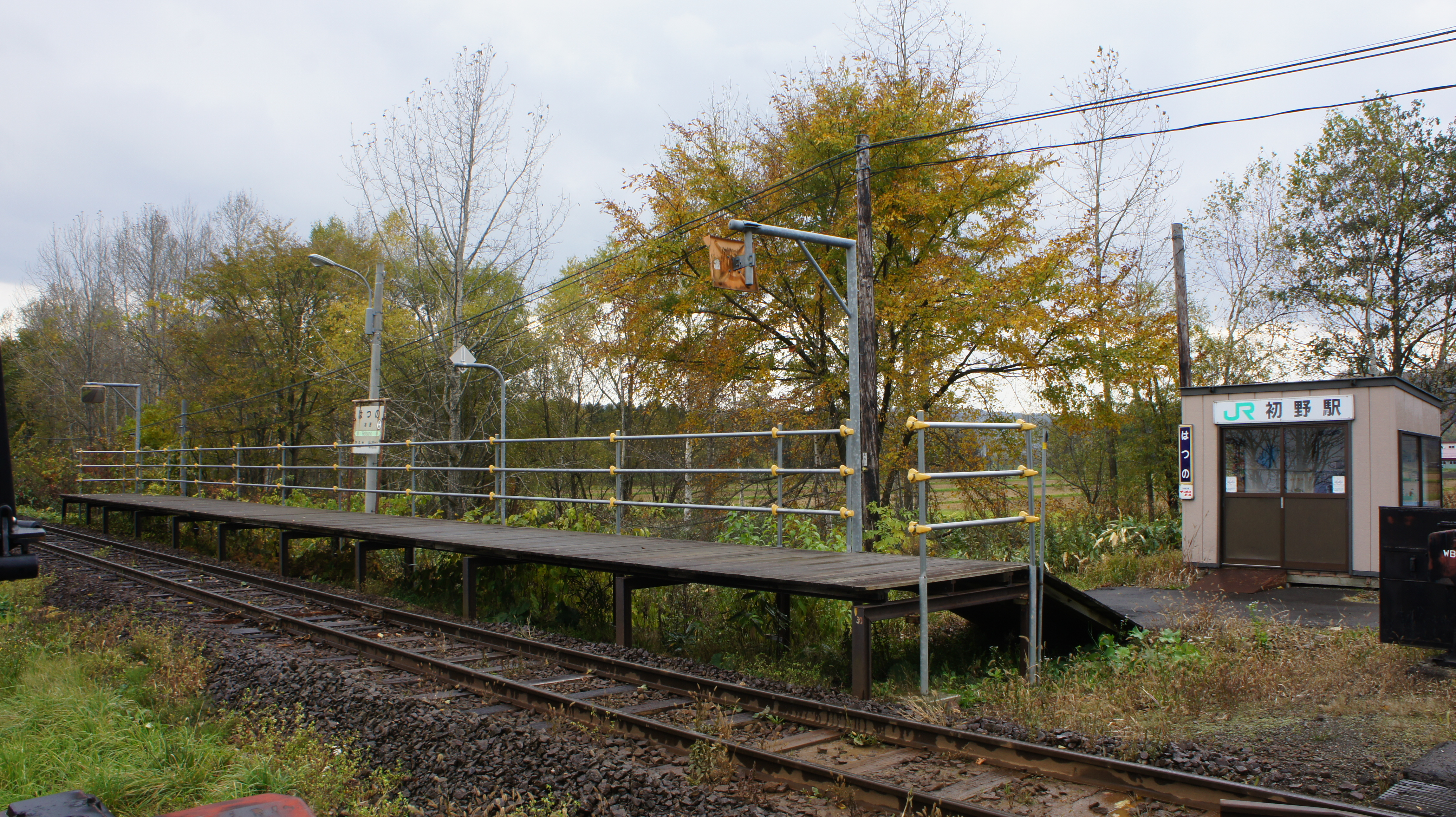 JR宗谷本線・初野駅全体 Sony NEX-3